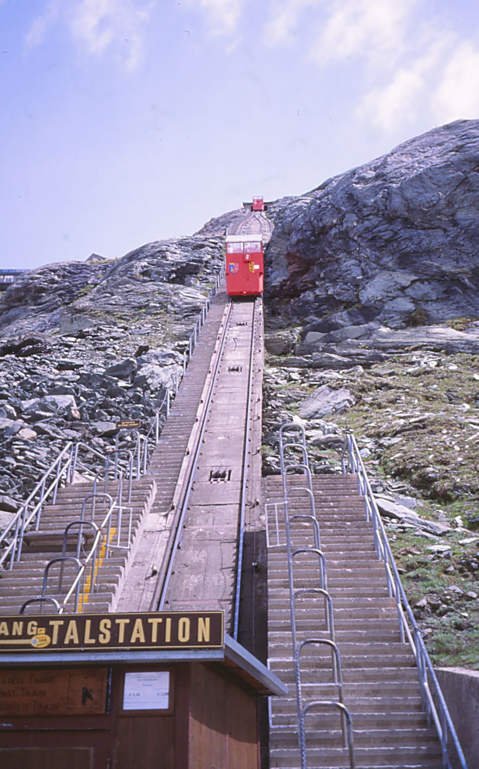 Großglockner Gletscherbahn set fra Dalstationen ved Pasterze-gletsjeren og op imod Topstationen ved Kaiser Franz Josefs Höhe.